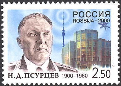 Почтовая марка России